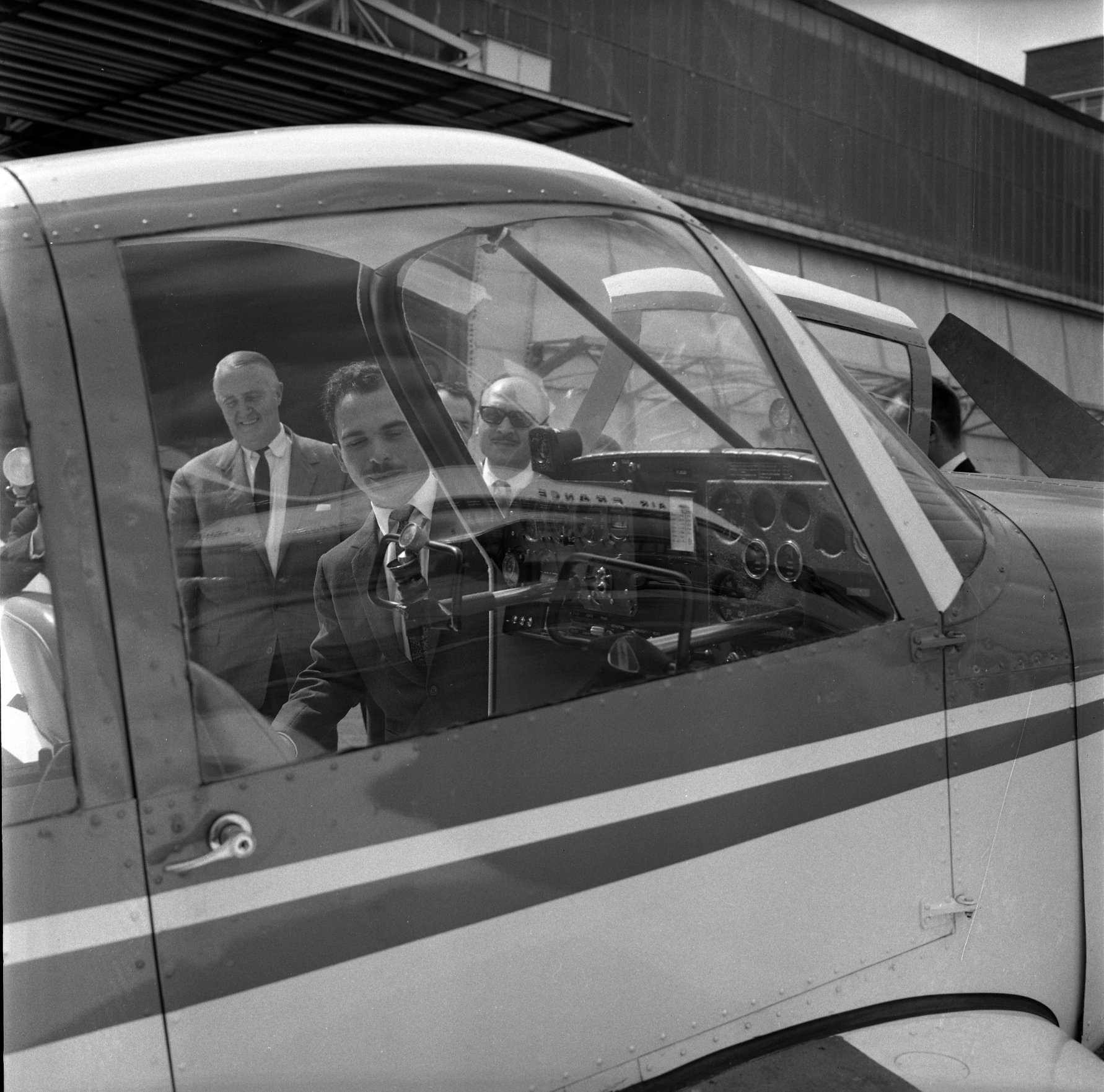 Sud Aviation. Le 16 Septembre 1963. Vue du roi de Jordanie en visite à Sud Aviation.